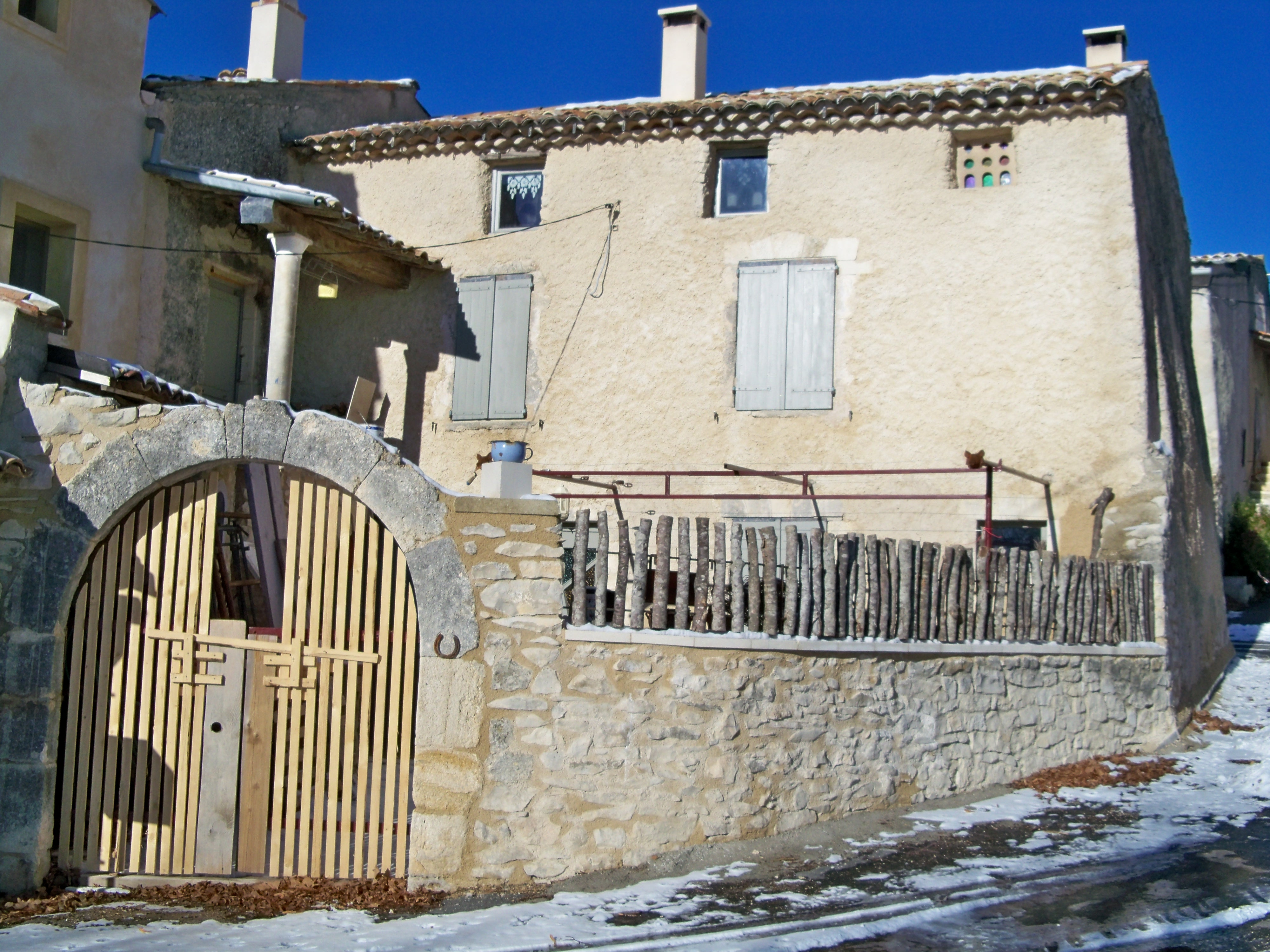 Maison avec ancien pigeonnier en facade, Ferrassières, Drôme, France